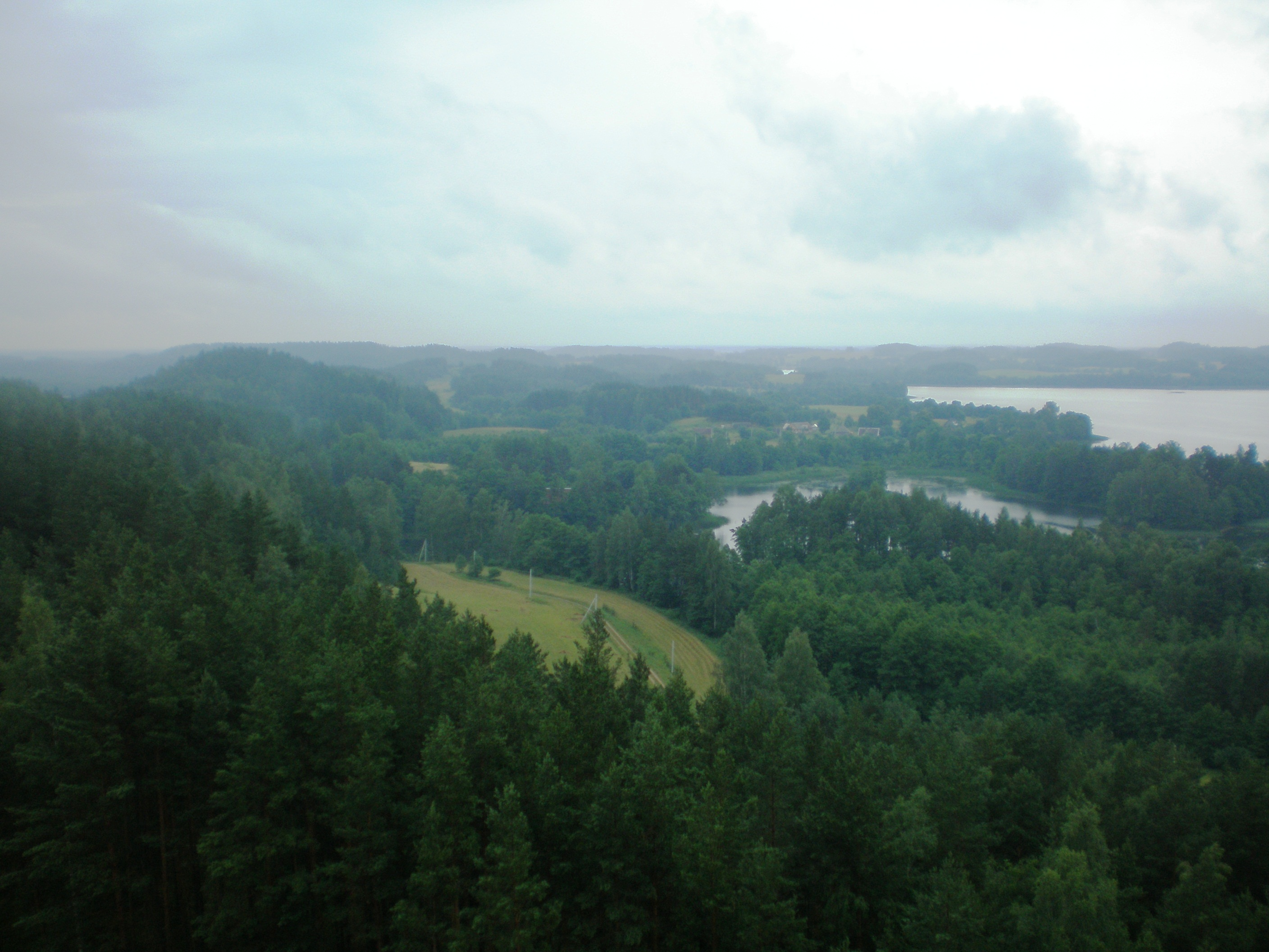 Aukštaičių Highlands in Aukštaitija NP, Lithuania